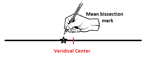 Ceci est un schéma du test de bissection de ligne